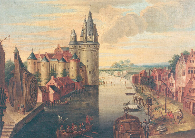 Gezicht op 't oud kasteel en de kraan te Kortrijk. anoniem schilderij uit 1651-1700. Stedelijke musea Kortrijk (Groeningeabdij)